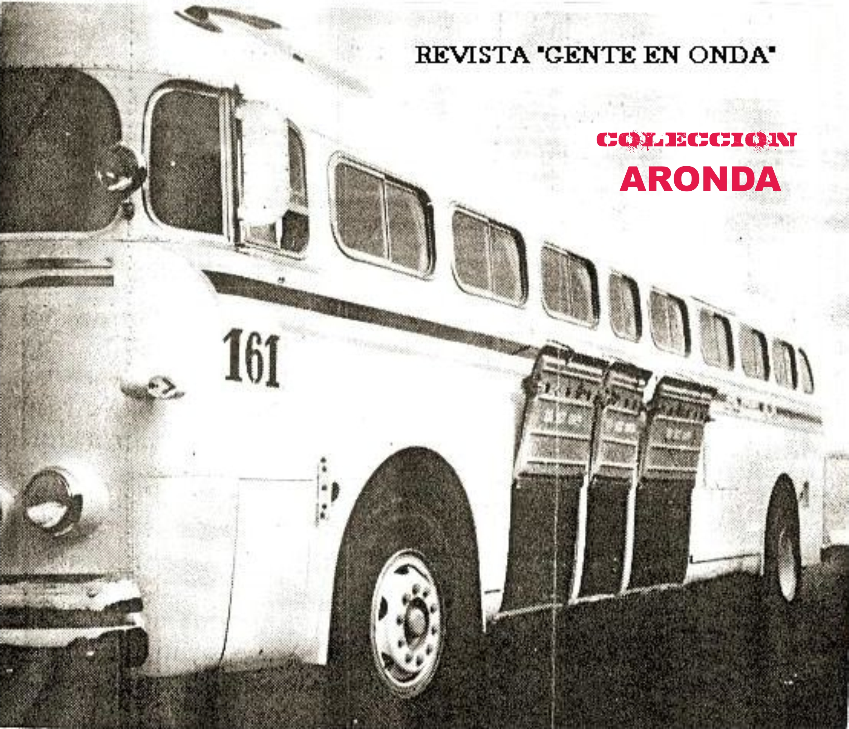 Primer autobus de la marca GM, que O.N.D.A. S.A. incorporo a su flota en 1947.